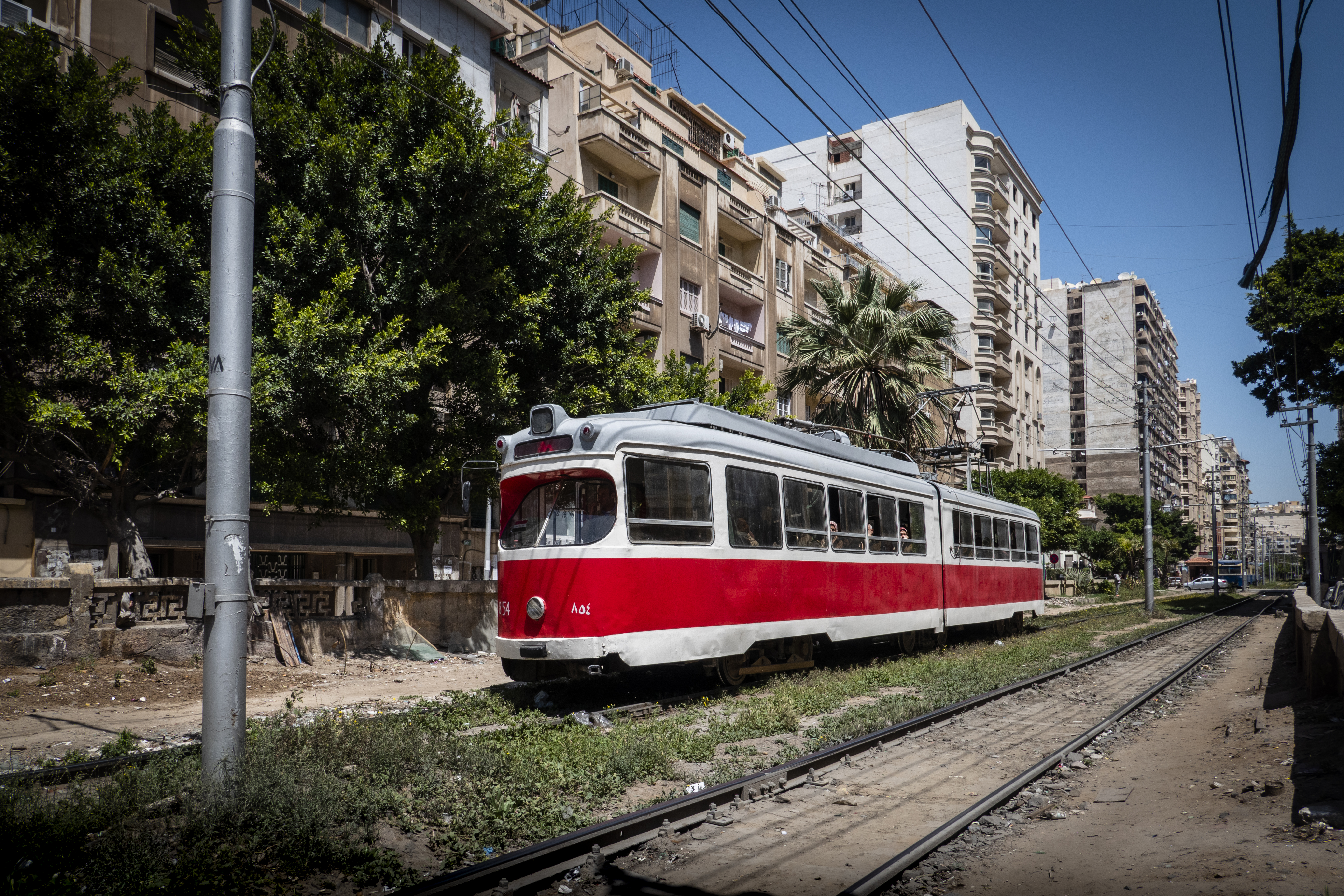 مصرى: تم تجديد بعض عربيات الترام القديمة الغير مستخدمة و دخلت الخدمة من جديد مع الحفاظ على طابعها القديم الصورة من محطة ترام رشدي (خط النصر) -الأسكندرية -مصر This is an image with the theme "Africa on the Move or Transport" from: Egypt